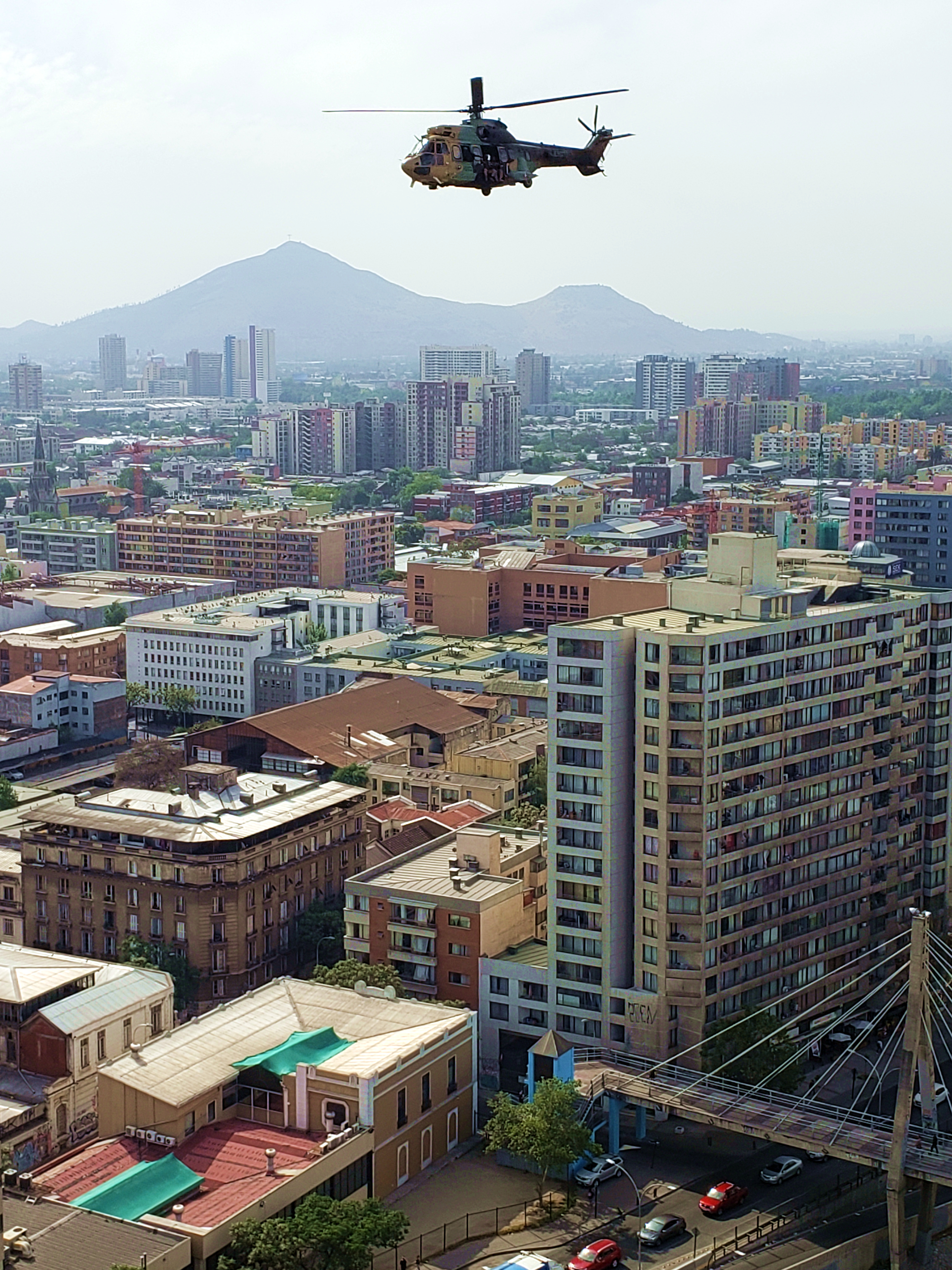 Helicóptero militar sobrevolando la comuna de Santiago en medio del estado de emergencia declarado el 19 de octubre de 2019